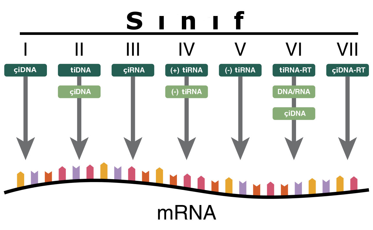 Baltimor sınıflandırması.